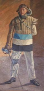 Ablichtung des Gemäldes „Der Sekundant“ von Karl Prahl. Es zeigt AH Kurt Schmidt-Klevenow in Sekundanten Ausrüstung